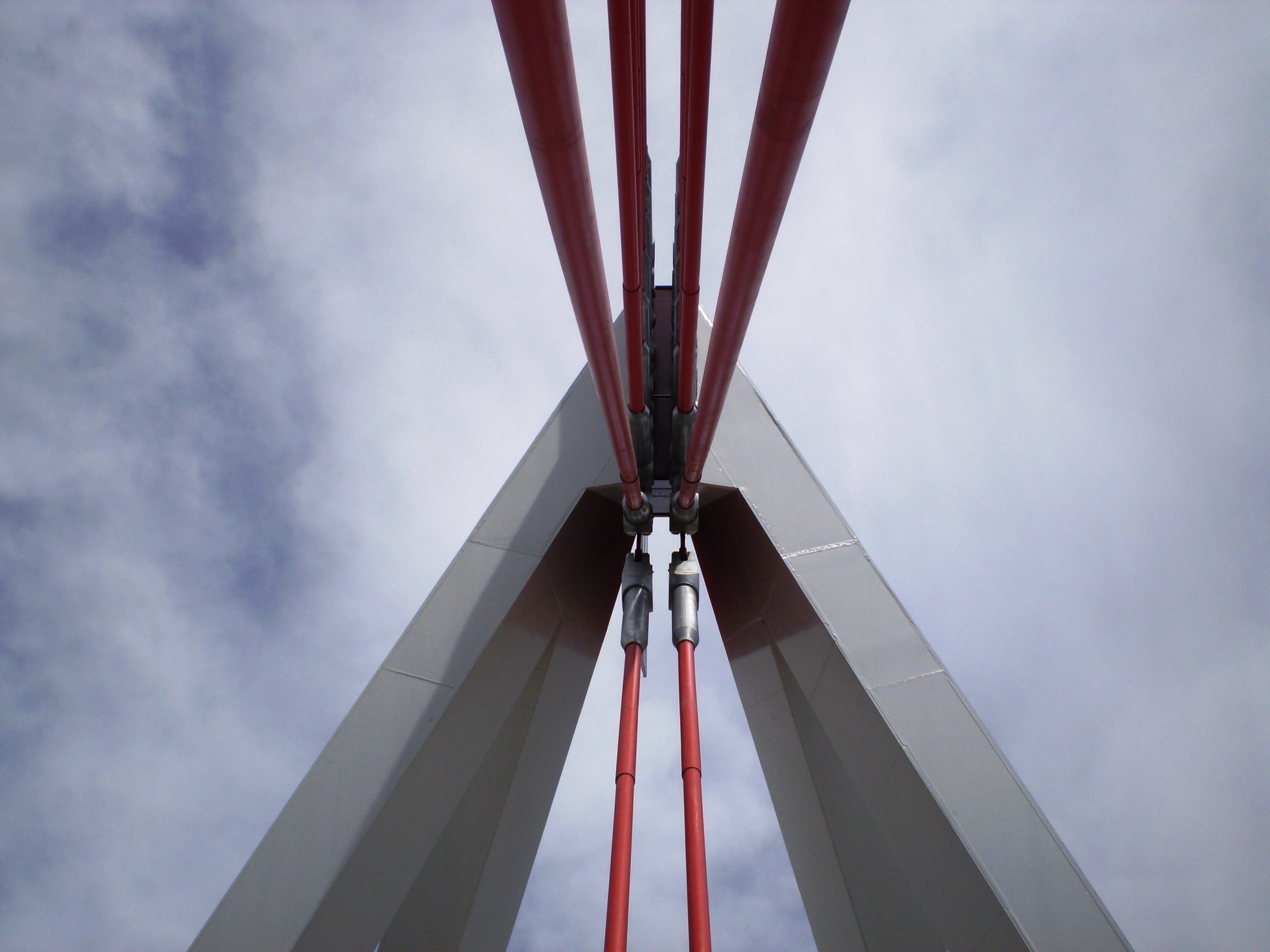 Puerta de Las Rozas Bridge, Las Rozas de Madrid, Community of Madrid, Spain